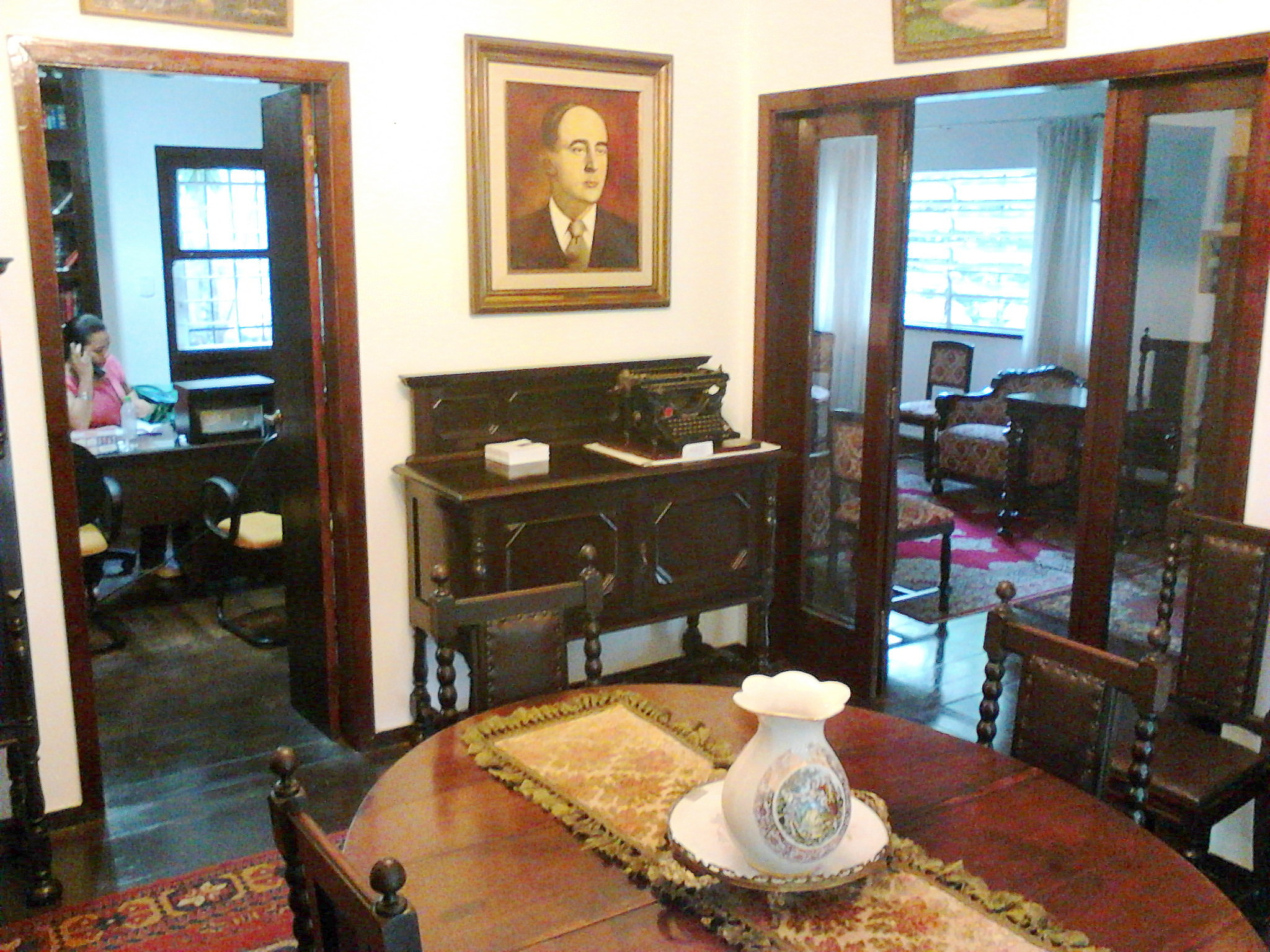 Ambiente interno do Centro Cultural e de Estudos Superiores Aúthos Pagano.